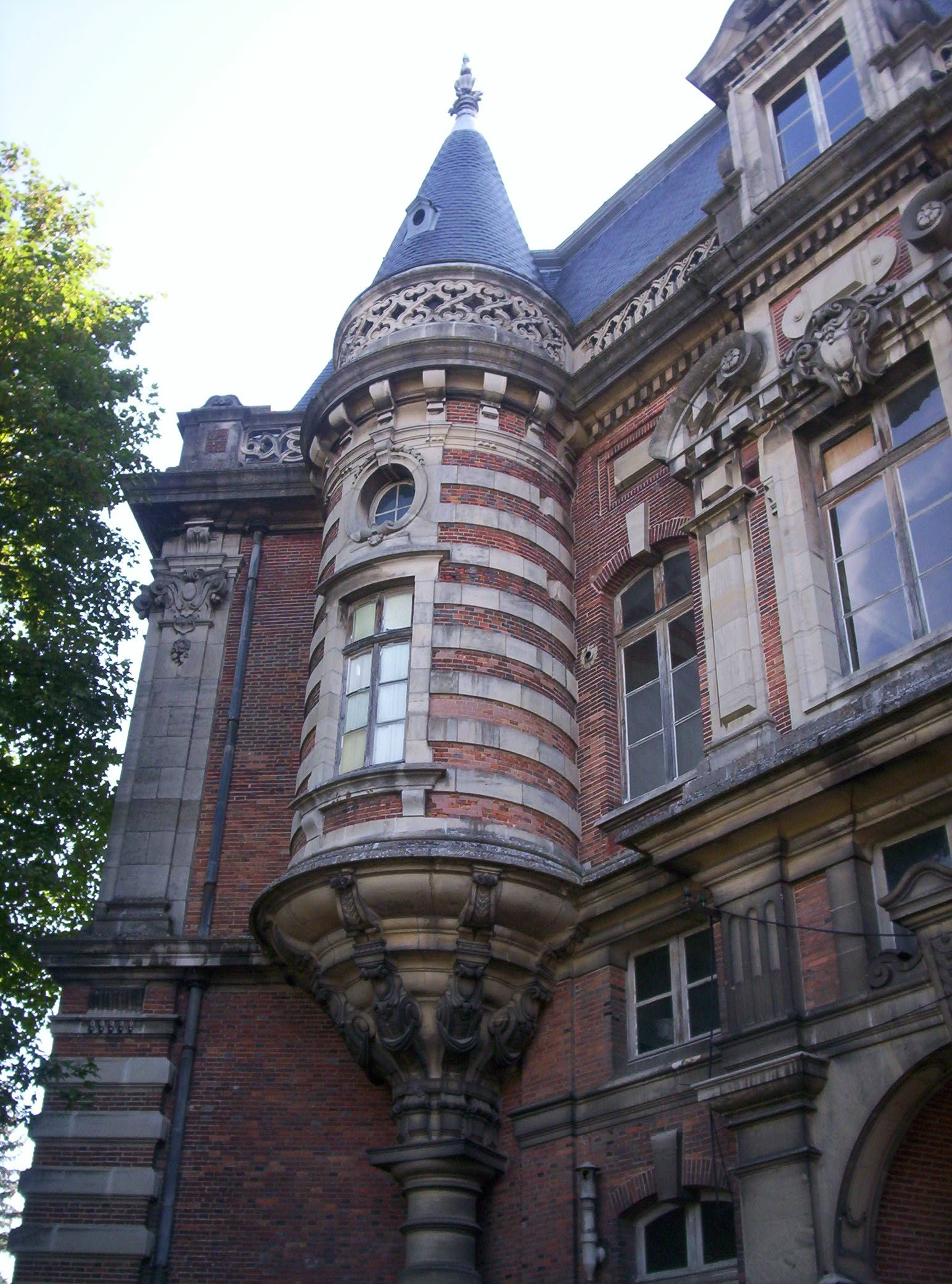 Détail du Château-Perrier, Épernay (Marne, France) construit en 1854.